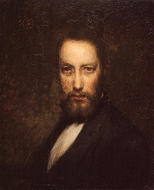 Mon portrait Self-portrait